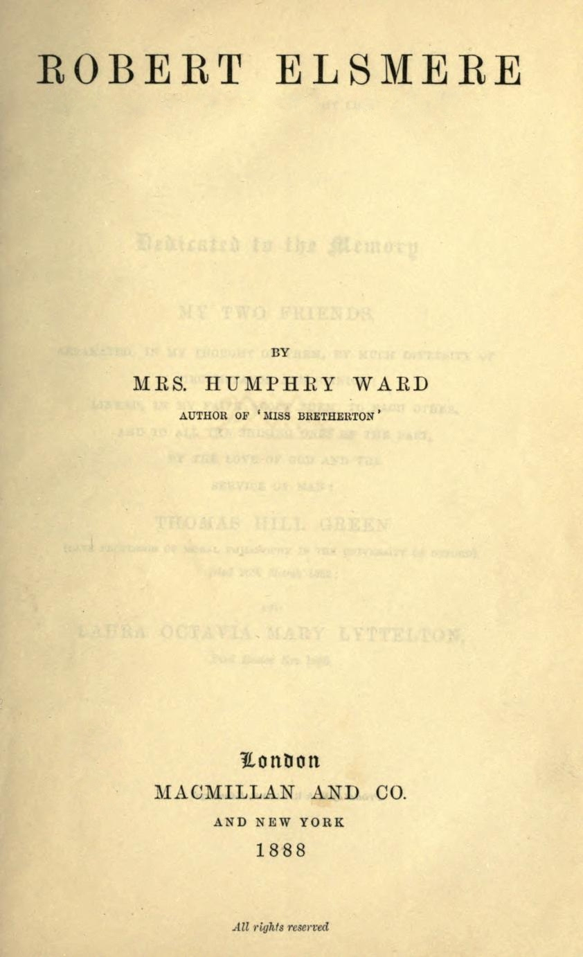 Robert Elsmere 1st ed title pg